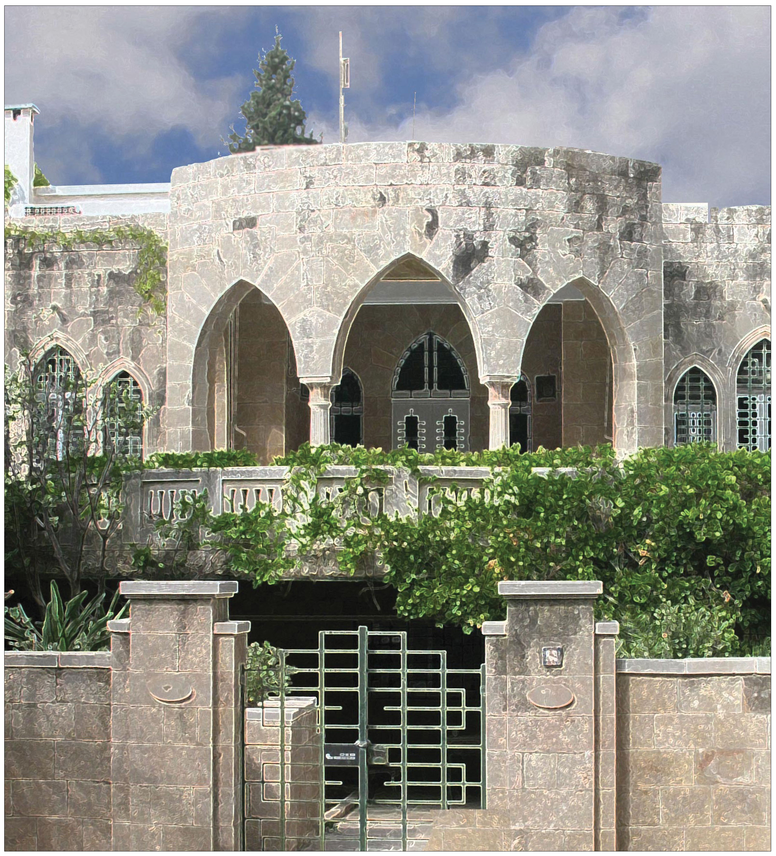 Le bâtiment du CAPE de Jérusalem